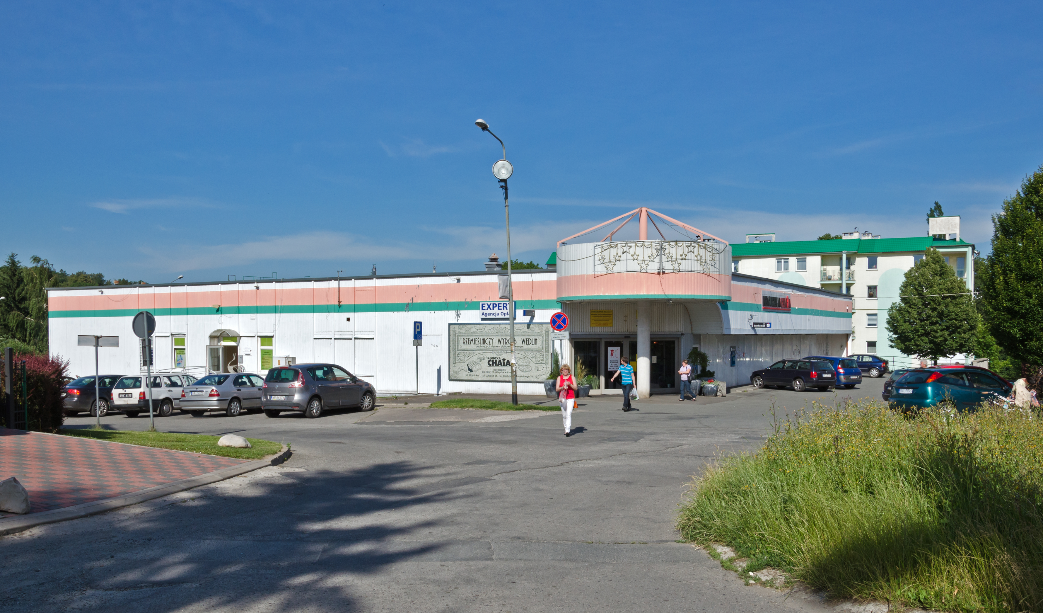 Kłodzko, ul. Wyszyńskiego, Chata Polska